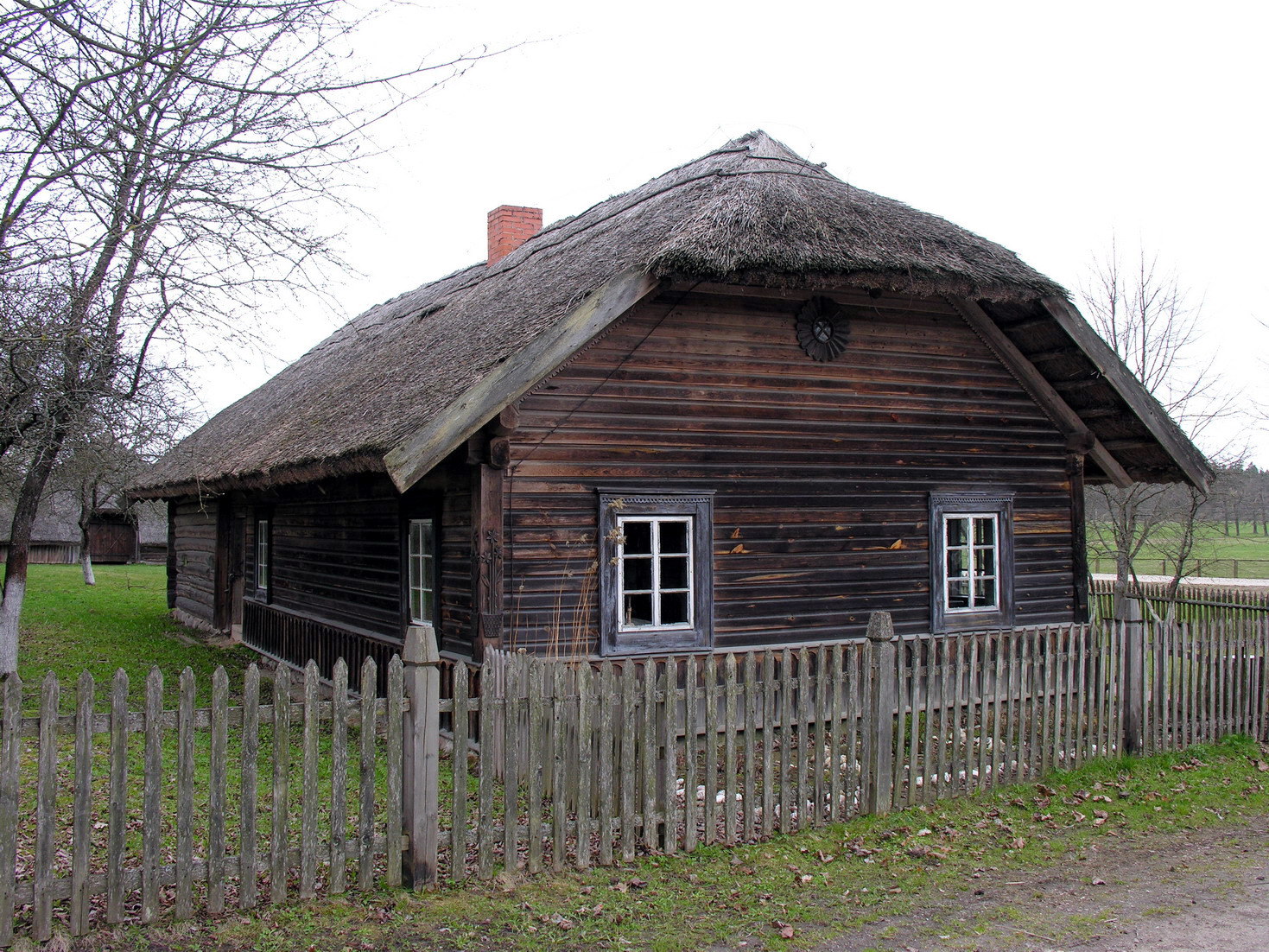 Pirkia 2007 m. balandžio 21 d., Lietuva